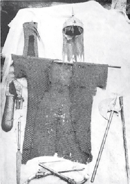 ГӀалгӀай: Юкъерча бIаьшерий гIалгIай тIемхочун герз. Корадаьд Оздигерча маьлхара каша.